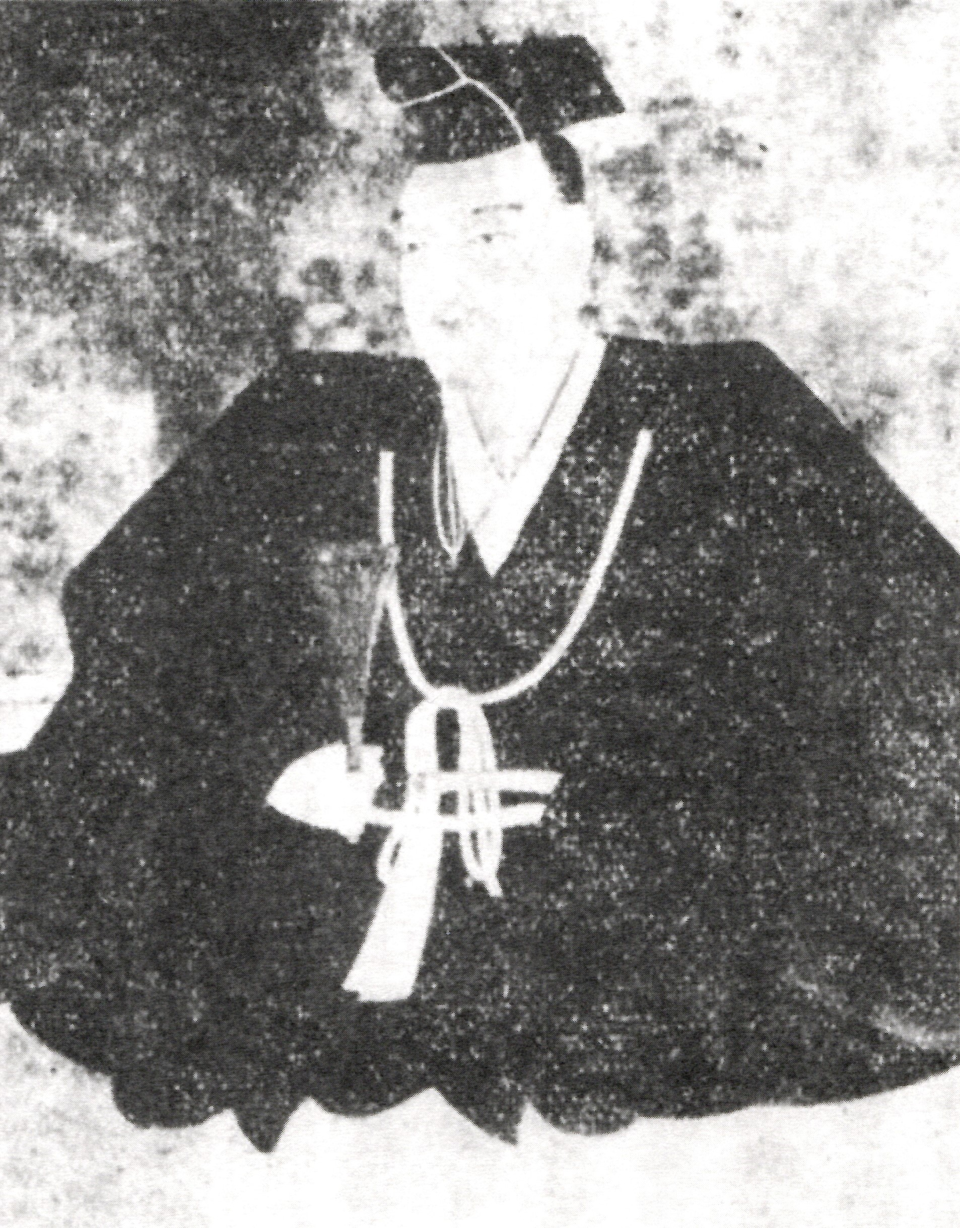 尚庸系永井家初代当主・永井尚庸の肖像画。